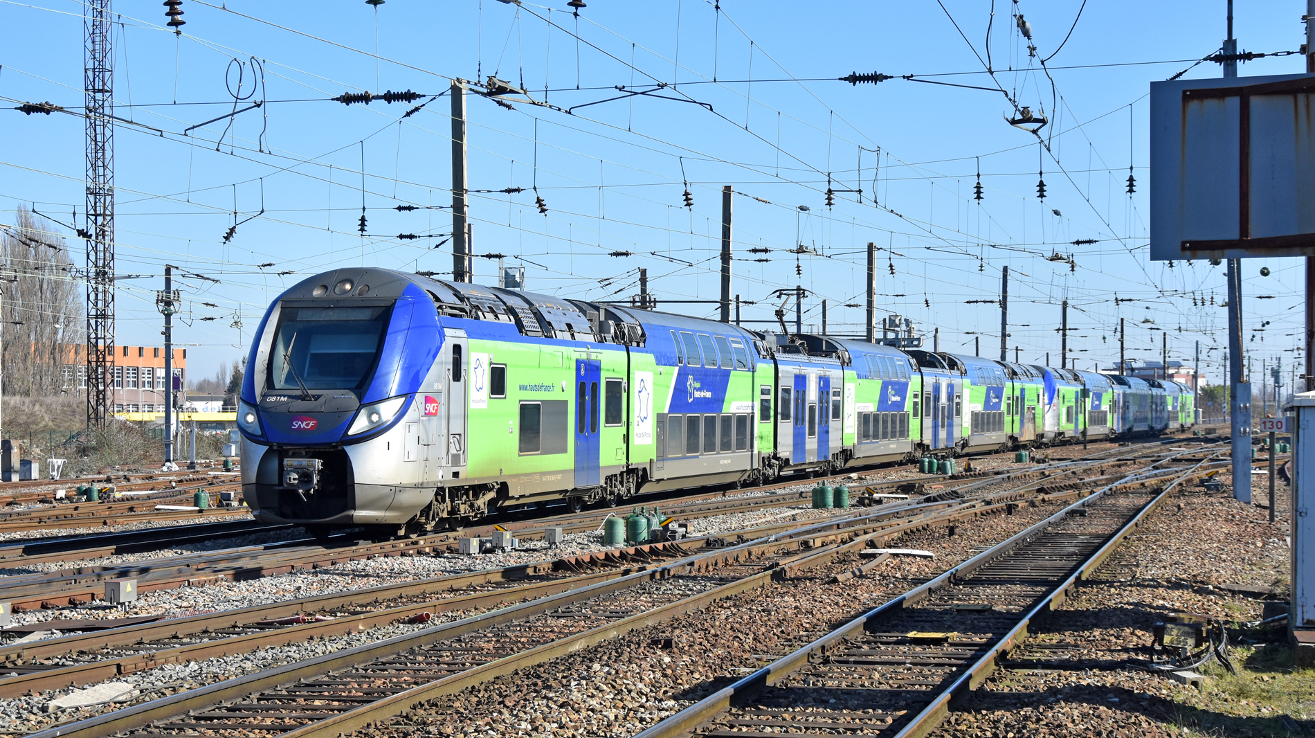 Z 55661/62 (081M) + Z 55747/48 (124M) à Amiens